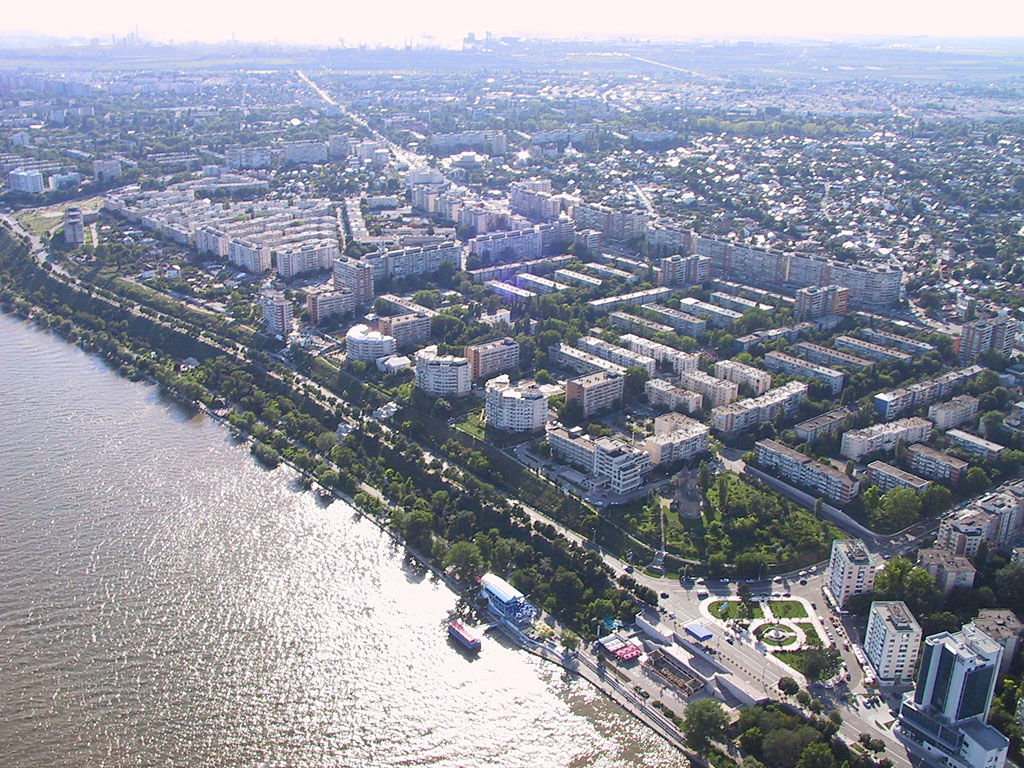 Galati - zona portului vechi